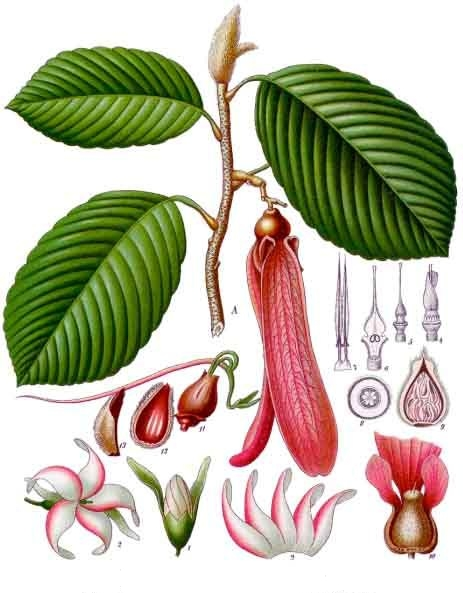 Gurjunbalsam. A fruchtender Zweig in 1/2 der natürl. Grösse; 1 Blüthenknospe, nat. Grösse; 2 Blüthe, desgl.; 3 Kronenblätter, auseinandergebreitet, desgl.; 4 Stempel mit Staubgefässen, etwas verkleinert; 5 derselbe ohne Staubgefässe, desgl.; 6 derselbe mit Fruchtknoten im Längsschnitt, desgl.; 7 Staubgefässe, desgl.; 8 Fruchtknoten im Querschnitt, natürl. Grösse; 9 Nuss im Längsschnitt, desgl.; 10 Frucht, der vordere Theil des Fruchtkelches entfernt, desgl.; 11 keimende Nuss, desgl.; 12 u. 13 Nusschalen, desgl. Fig. 1 bis 8 zu Dipt. trinervis, die übrigen Figuren zu D. retusus gehörig.